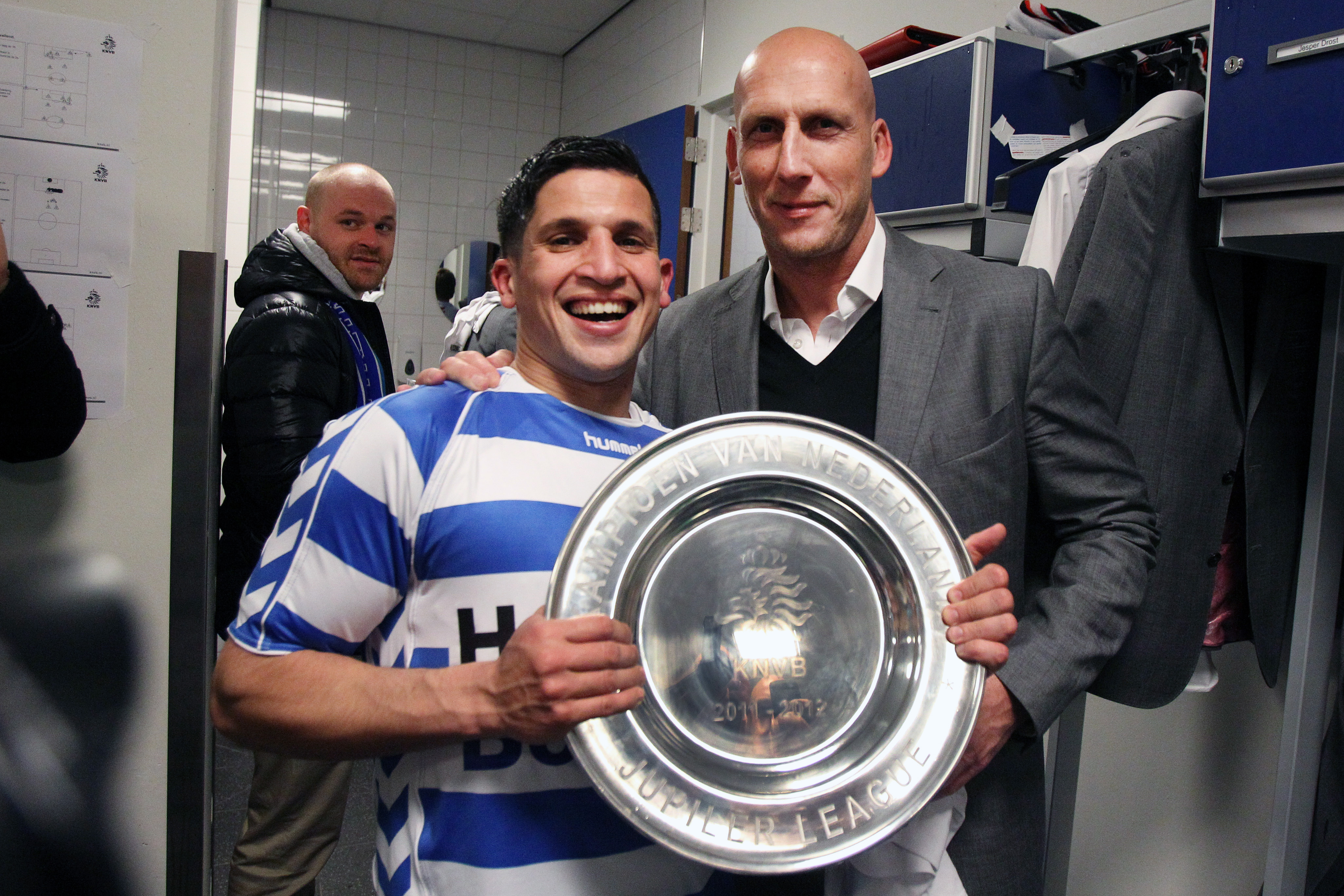 Said Bakkati (links) met Jaap Stam (rechts) met de kampioensschaal nadat FC Zwolle kampioen is geworden van de Eerste Divisie